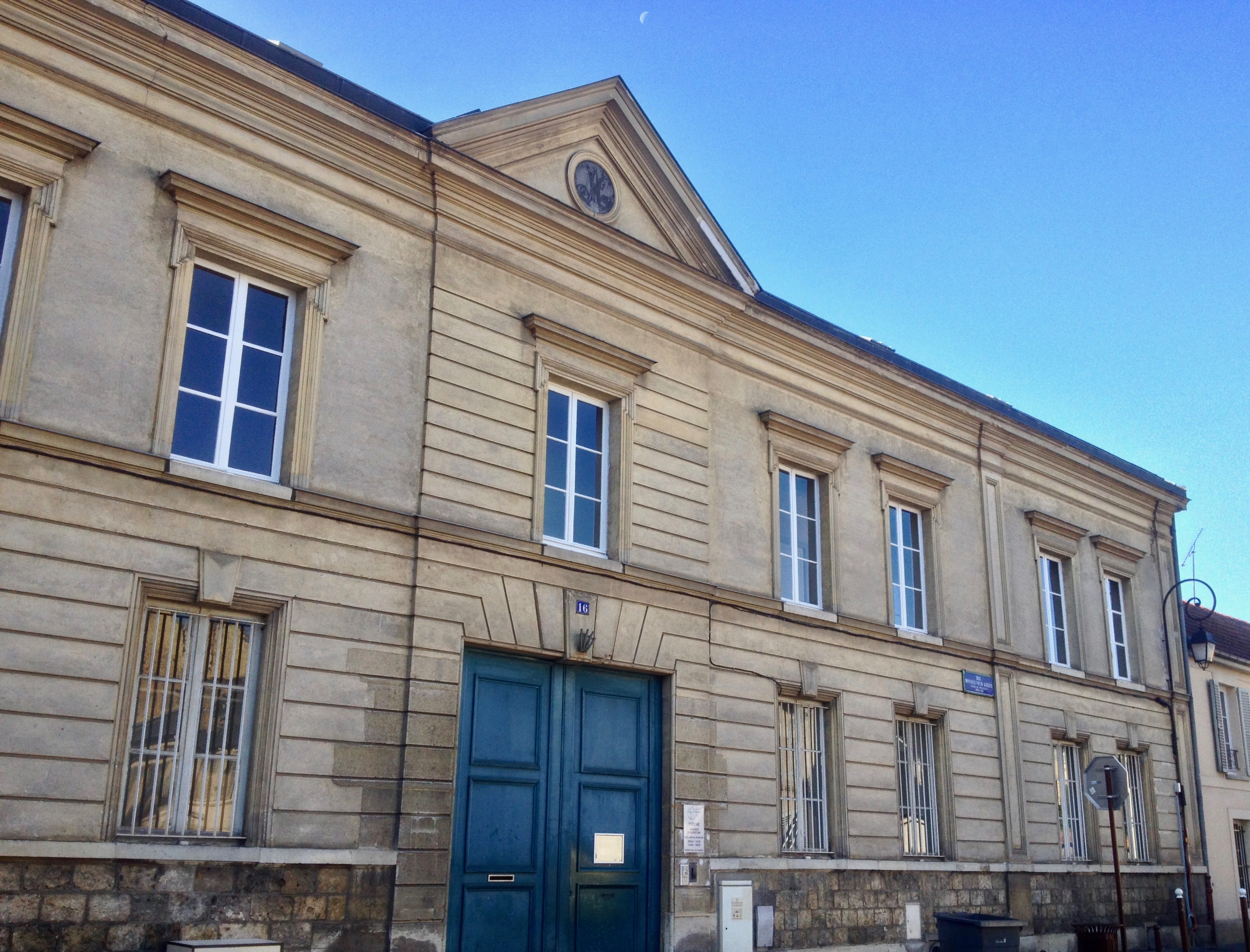 le bâtiment de l'évêché de Versailles